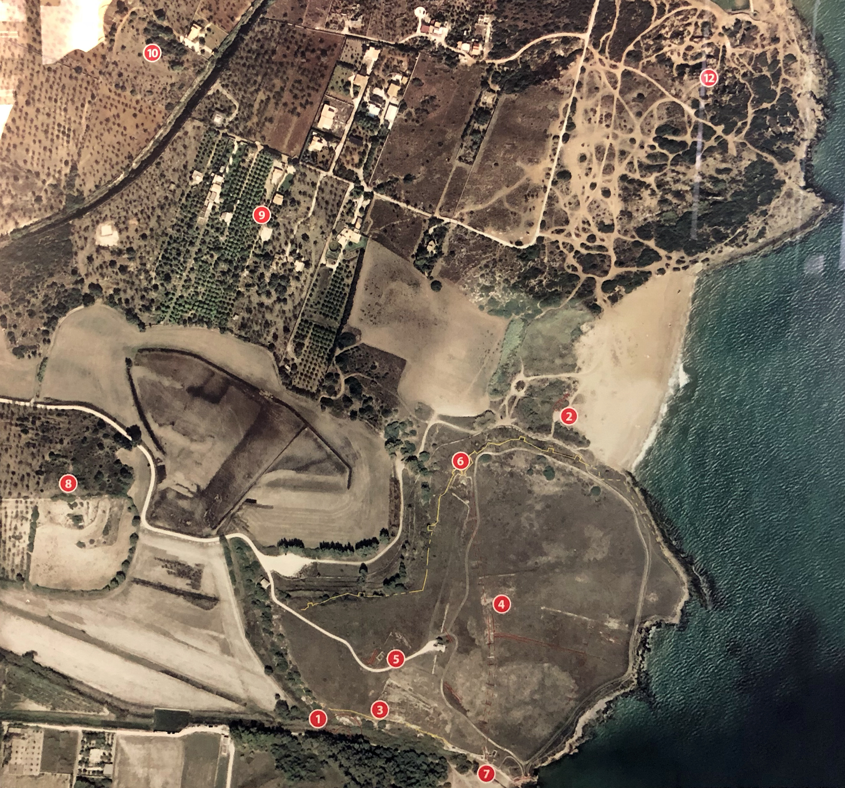 1. teatro 2. ? 3. Santuario di Demetra 4. Agorà 5. Asklepieion 6. porta nord 7. porta sud 8. Necropoli A 9. Necropoli D 10. Necropoli C 11. Necropoli B 12. Latomie 13. colonna Pizzuta